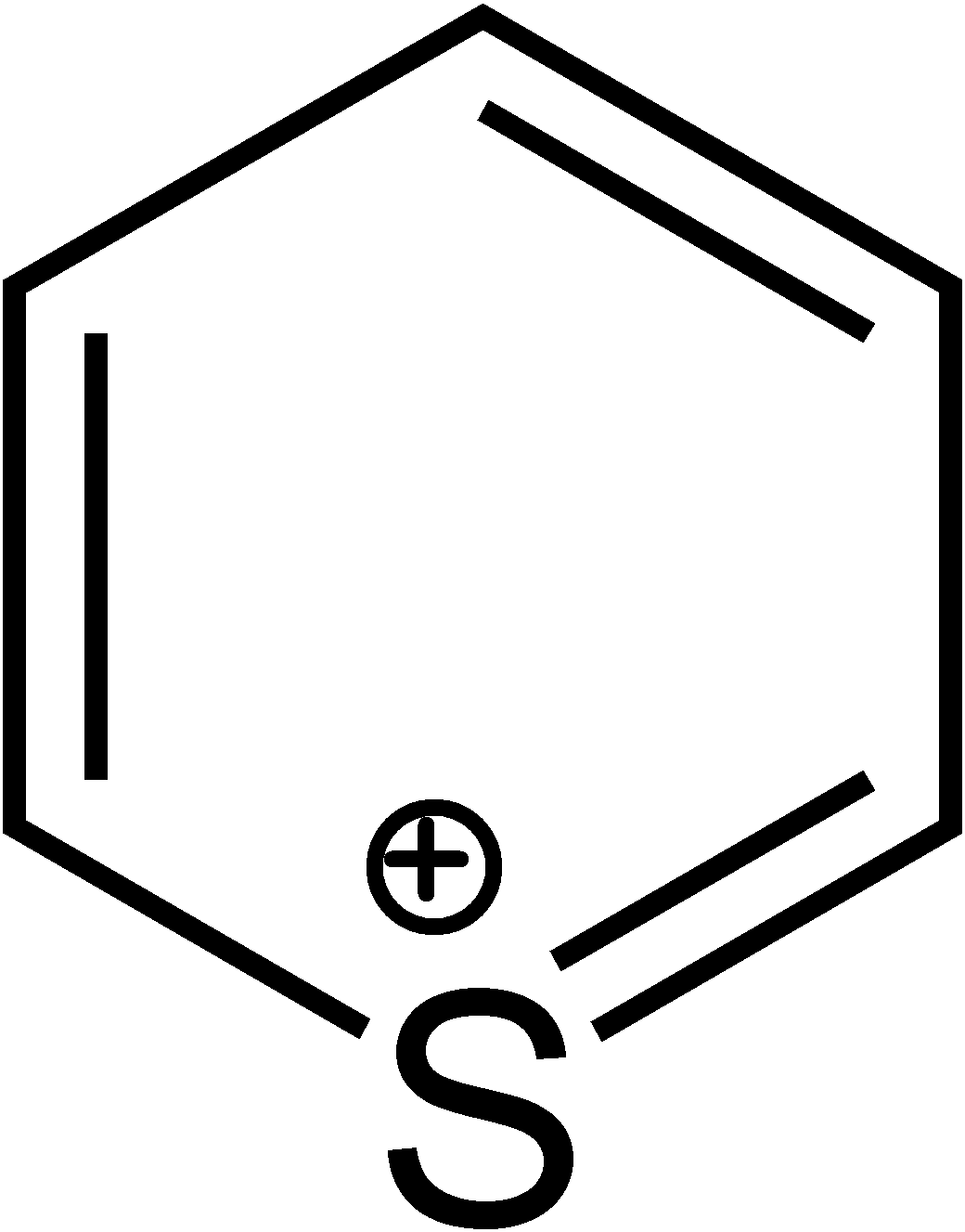 Struktur des Thiopyryliumions